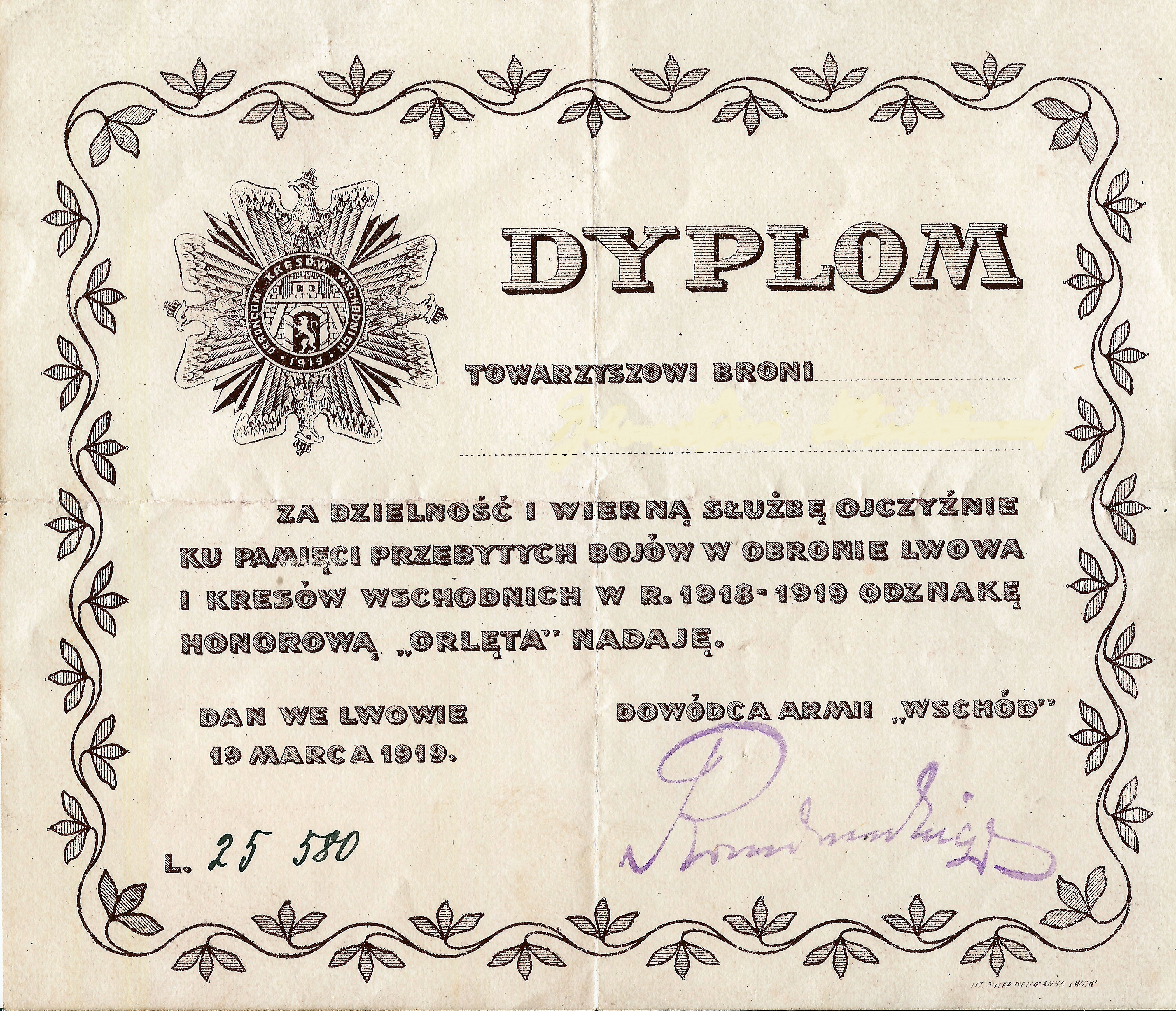 Dyplom nadania Odznaki Honorowej "Orlęta"